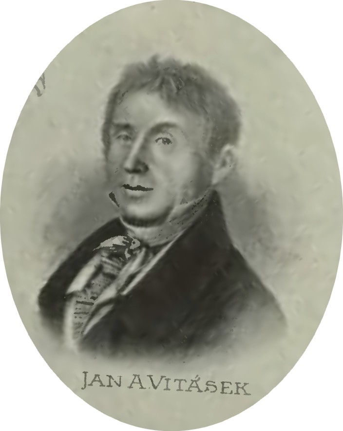 Portrét – Jan Matyáš Nepomuk Augustin Vitásek (1771 - 1839), Český hudební skladatel a klavírista.